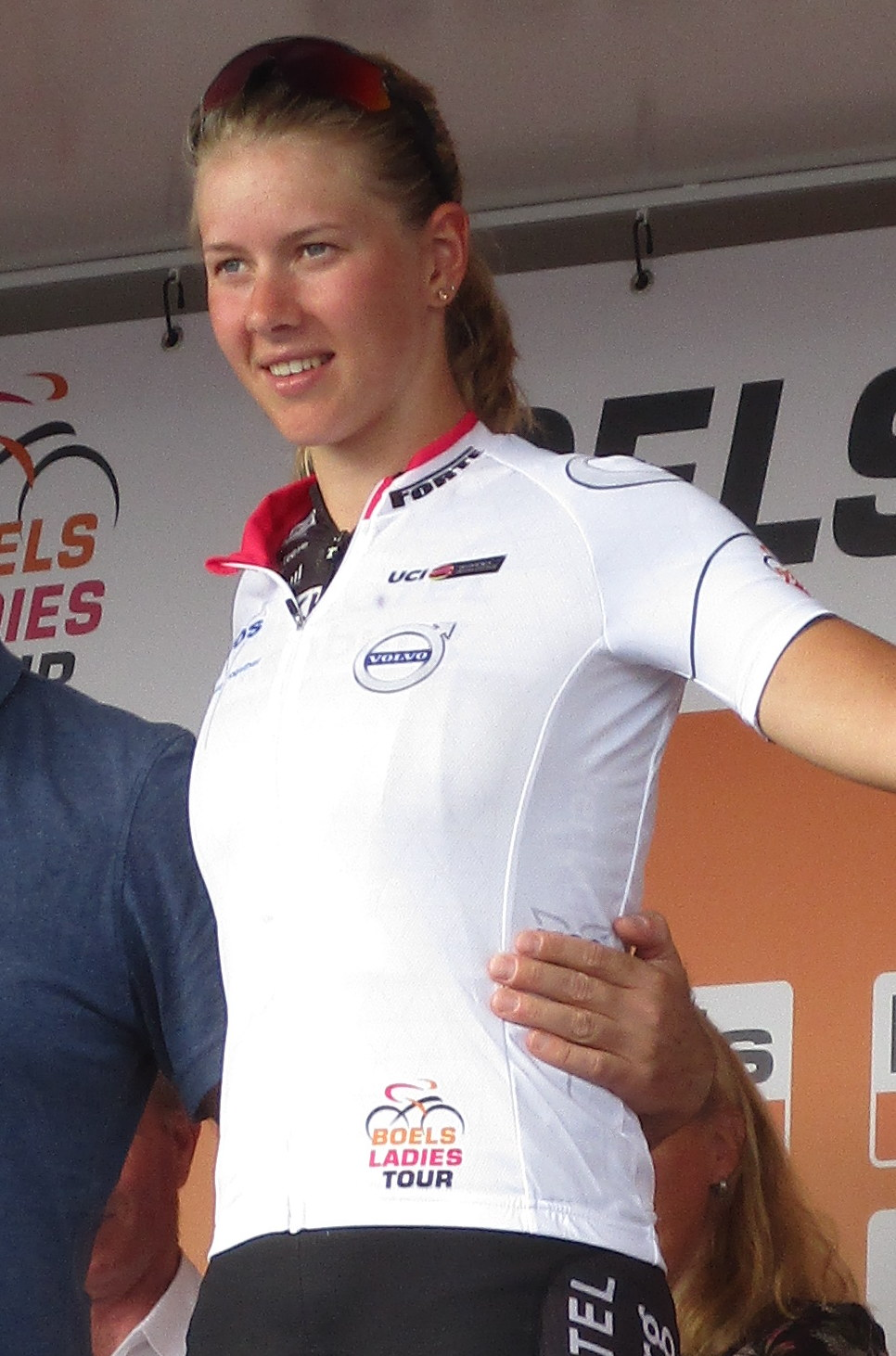 Huldiging van de winnaars van de Boels Ladies Tour 2017 op het Tom Dumoulin Bike Park in Sittard-Geleen.